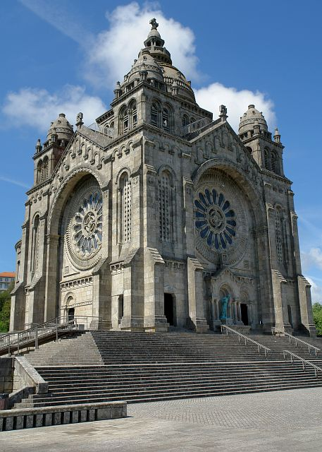 Santuário de Santa Luzia, freguesia de Santa Maria Maior, cidade, concelho e distrito de Viana do Castelo, Portugal.